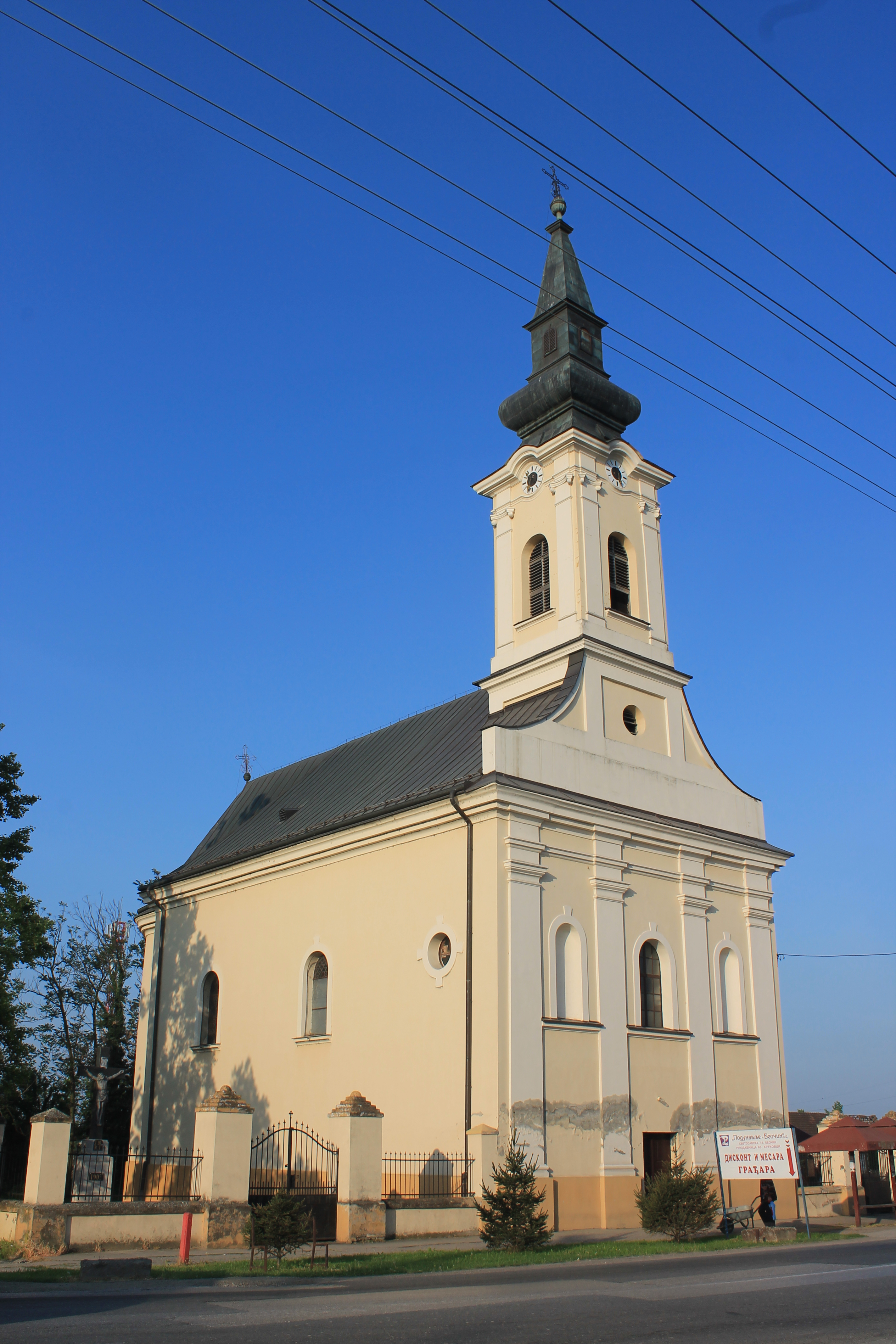 Rimokatolička crkva svetog Klimenta u Hrtkovcima